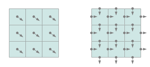 grille normal et staggered-grid